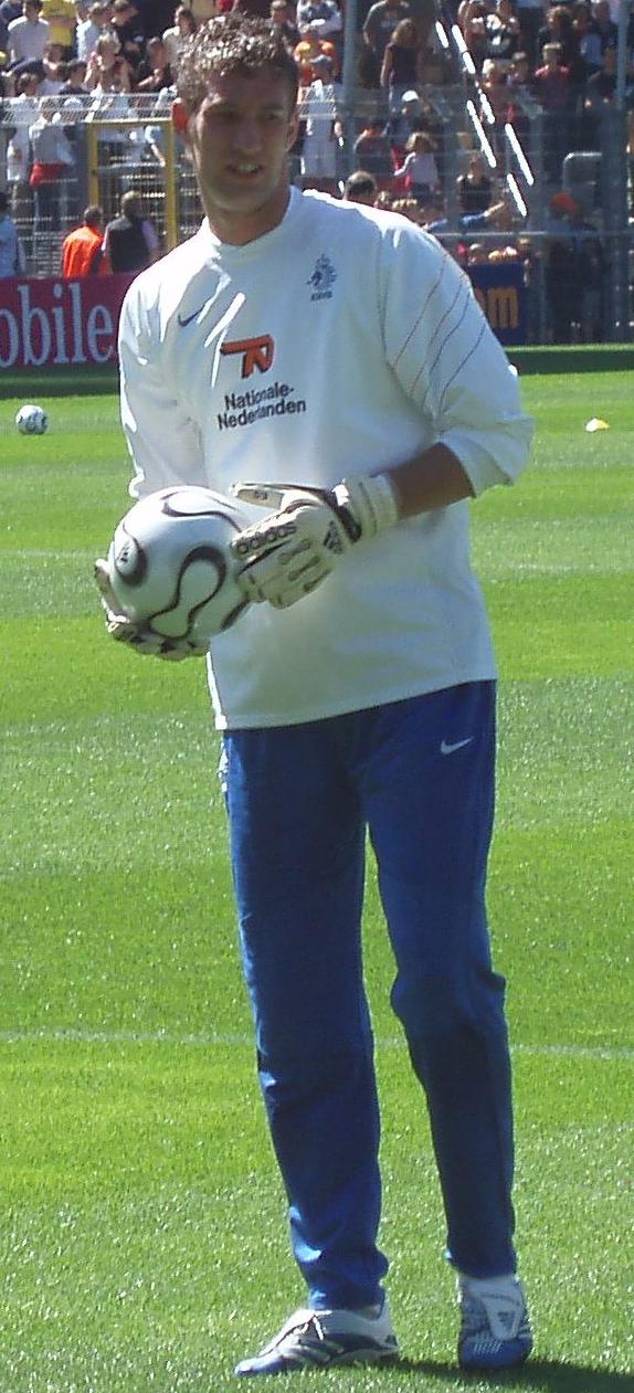 Maarten Stekelenburg, Spieler der niederländischen Fußballnationalmannschaft